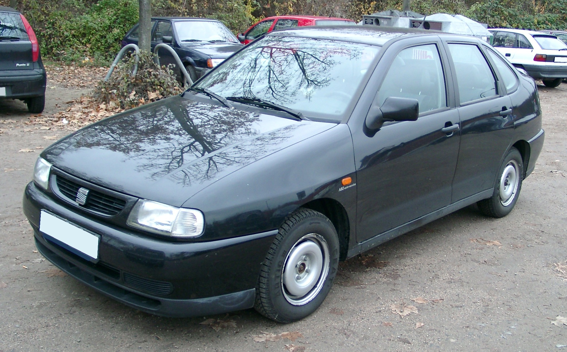 Seat Córdoba, 1. Generation